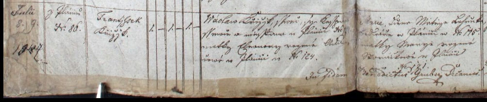 frantisek krizik's birth certificate